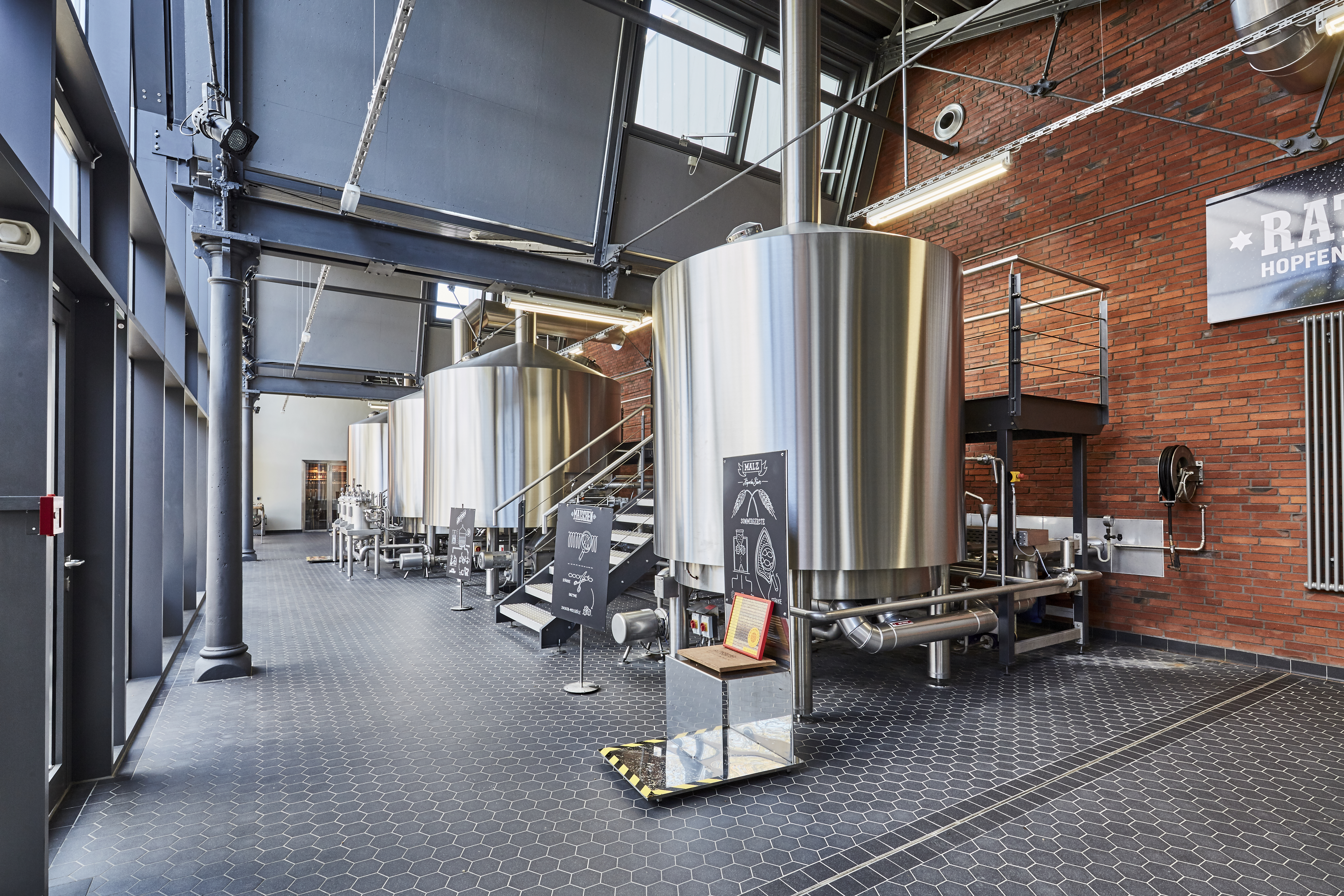 Ratsherrn Macro Brauerei mit 50hl Sudwerk